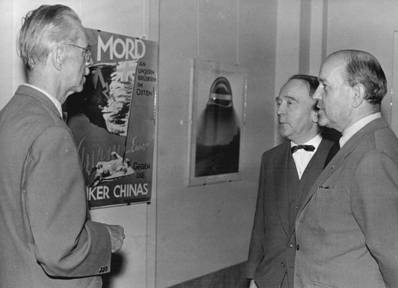 Zentralbild / Kohls / 4.6.1960 / Ausstellung der Akademie der Künste Zum sechzehnjährigen Bestehen zeigt die Deutsche Akademie der Künste Werke ihrer Ordentlichen und Vorrespndierenden Mitgliedern der Sektion Bildende Kunst. Die Ausstellung wir dam 3.6.1960 in den Räumen der Akademie am Robert-Koch-Platz eröffnet. UBz: Der Präsident der Akademie Otto Nagel (links) im Gespräch mit John Heartfield (2.v.l.) und Wieland Herzfelde über eine Fotomontage von Heartfield. Abgebildete Personen: Nagel, Otto Prof.: Maler, Präsident der Akademie der Künste (AdK), Nationalpreisträger, Vaterländischer Verdienstorden (VVO) in Gold, DDR (GND 118586300)